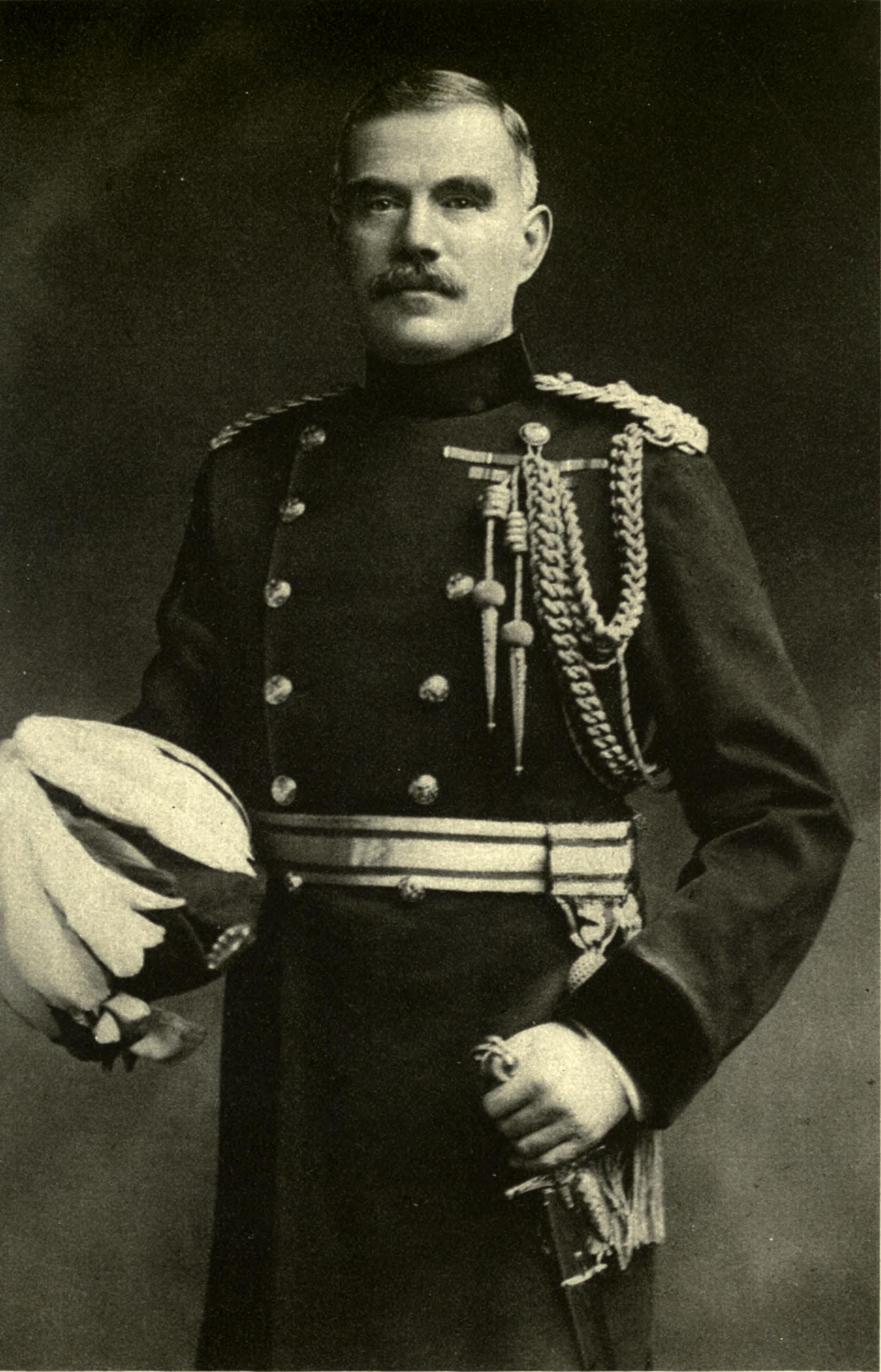 General Sir William Robertson